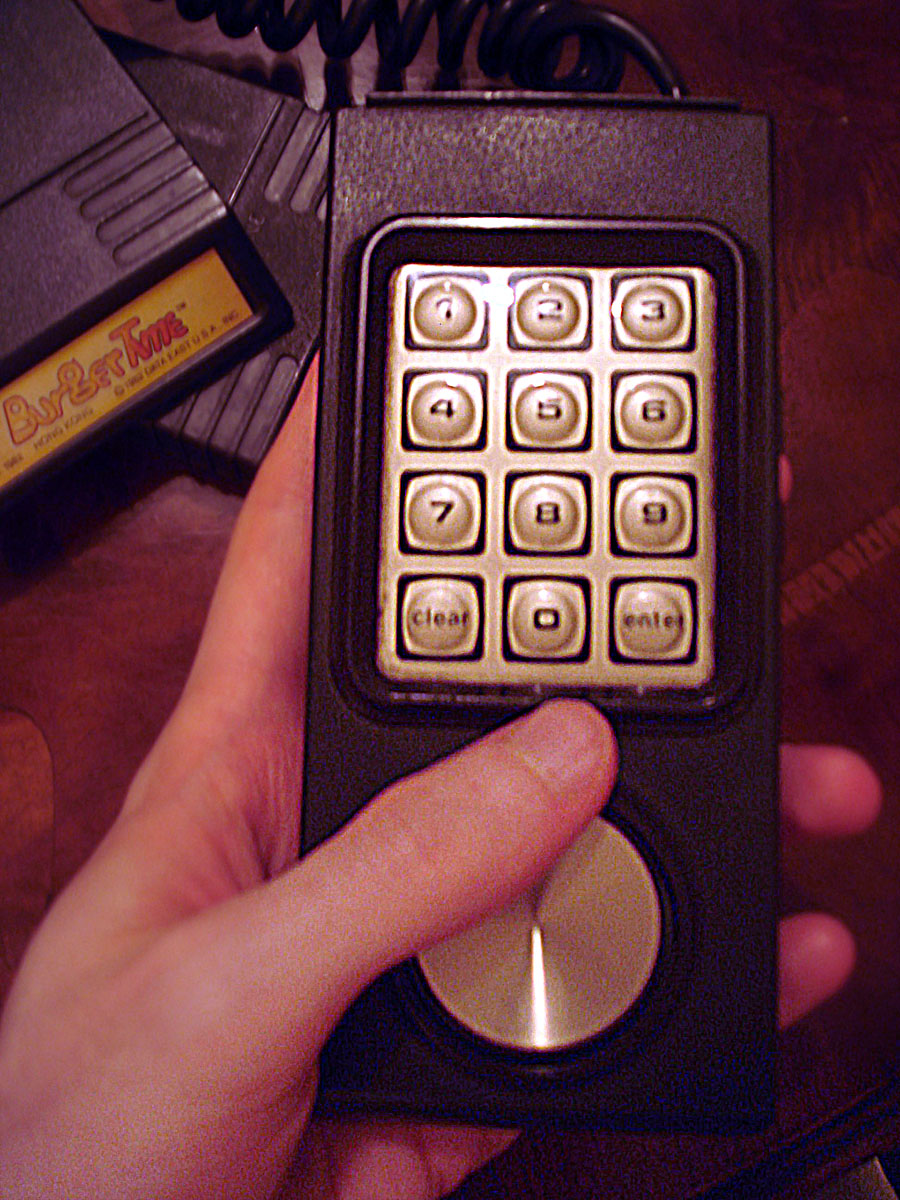 Intellivision controller